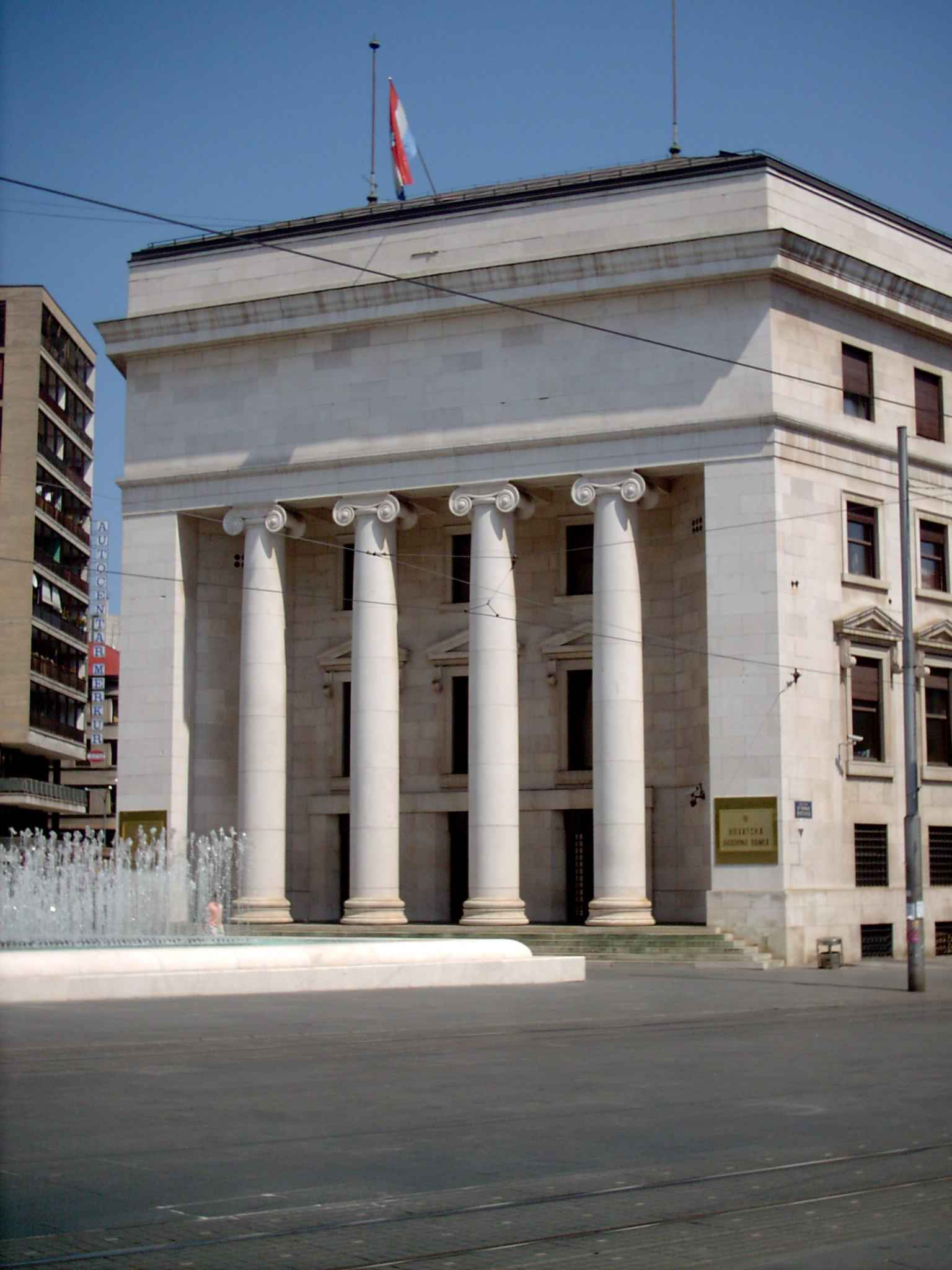 Kroatische Nationalbank, Zagreb